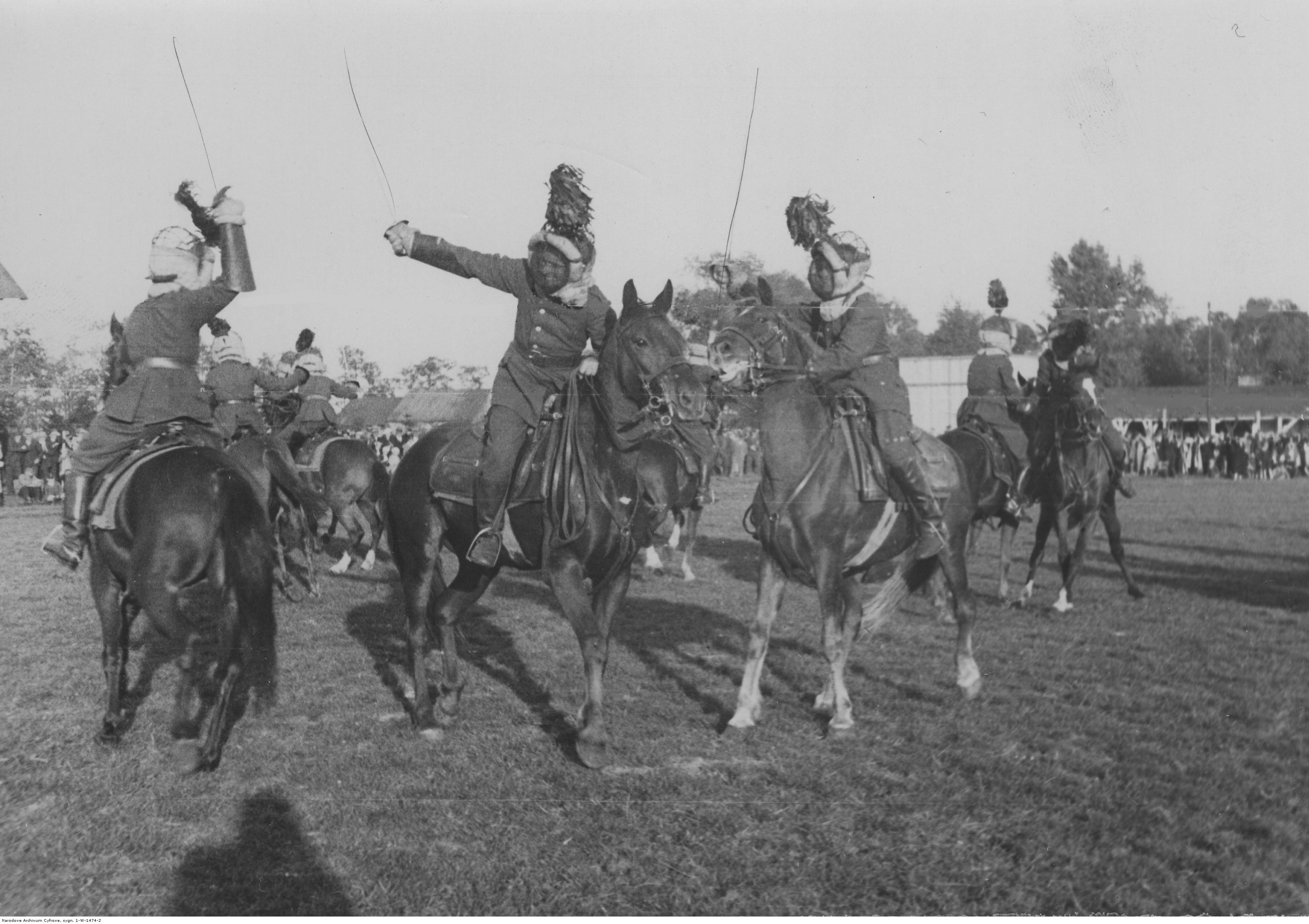 Popisy kawaleryjskie w 5 Dywizjonie Artylerii Konnej w Krakowie - pojedynek kawaleryjski. Koncern Ilustrowany Kurier Codzienny - Archiwum Ilustracji. Sygnatura: 1-W-1474-2